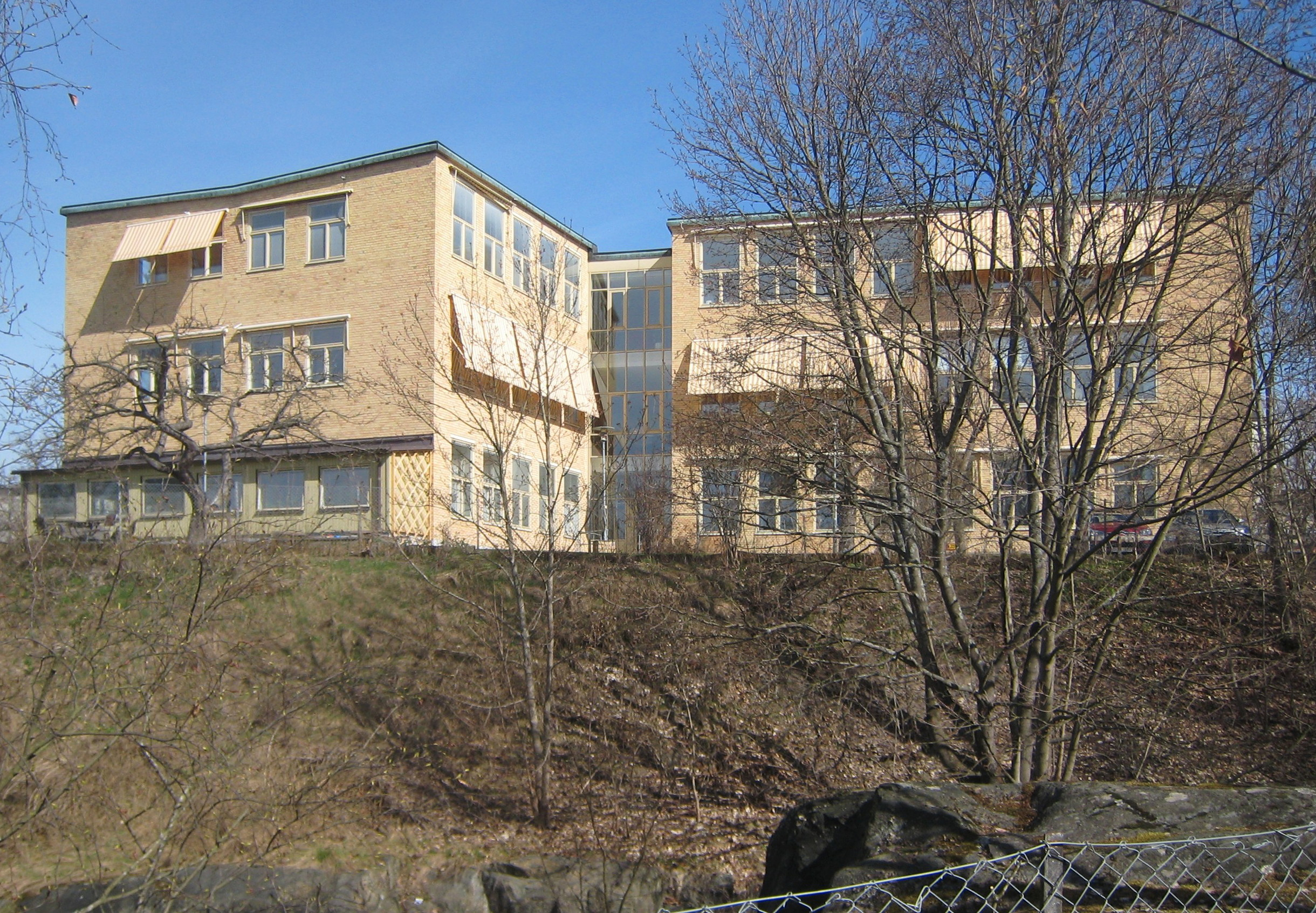 Erikdalsskolan in april 2010.